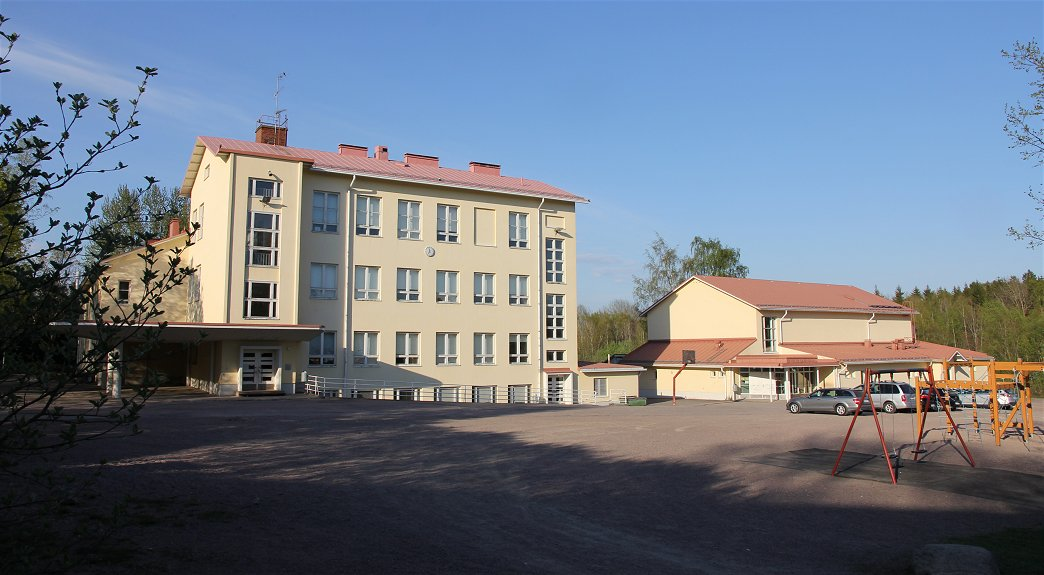 Tuomelan koulu (rakennettu: vanha osa 1931, laajennus 1957) Vantaan Hämeenkylän kaupunginosassa. Huom: Kuvan käyttö edellyttää lisenssiehtojen mukaisesti viittausta kuvaajaan.